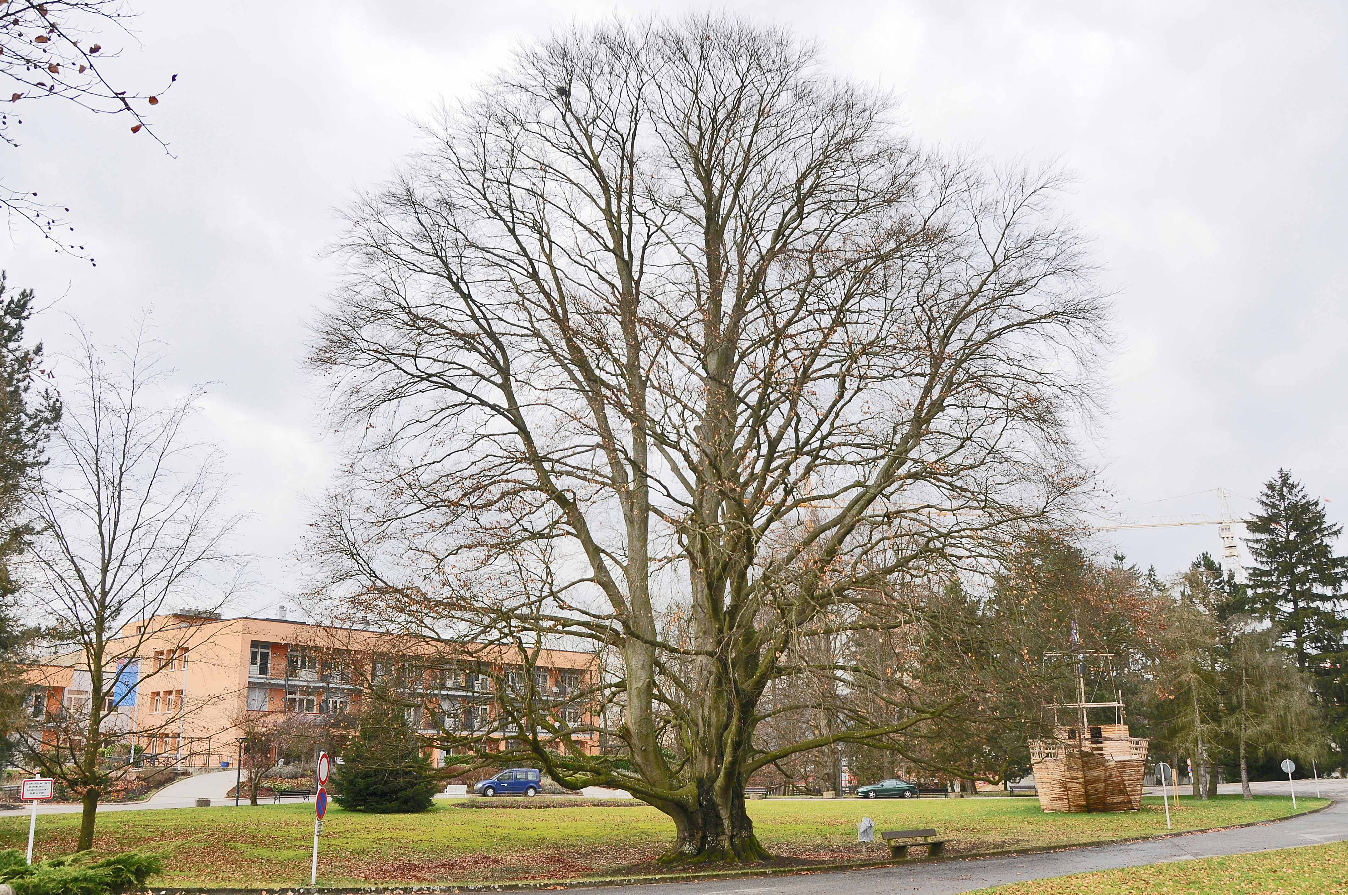 Bluttbuch zu Bouferdeng. Kategorie:Bemierkenswäert Beem zu Lëtzebuerg + Kategorie:Gemeng Luerenzweiler